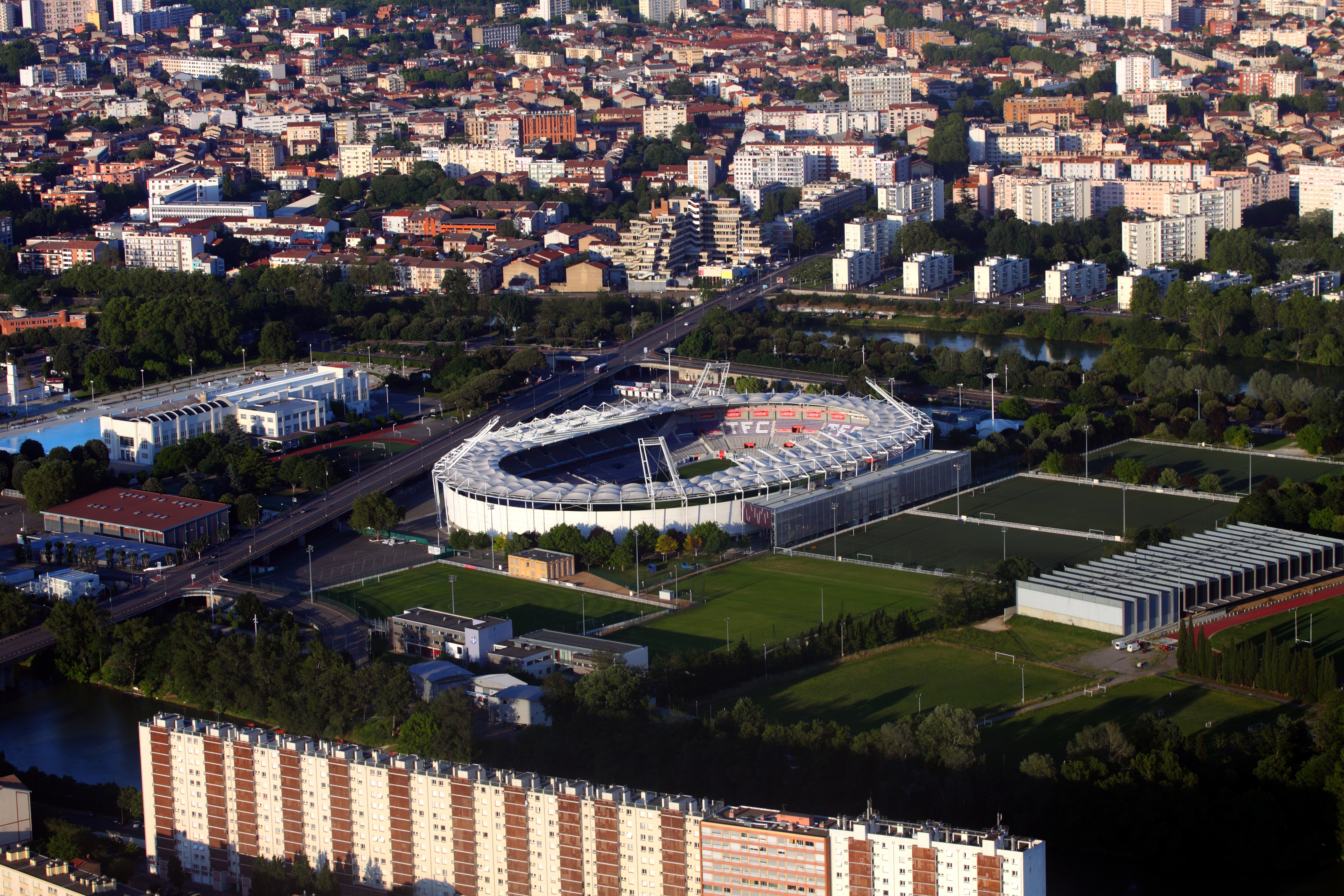 Vue aérienne de l'Île du Ramier à Toulouse (Haute-Garonne, Midi-Pyrénées, France).